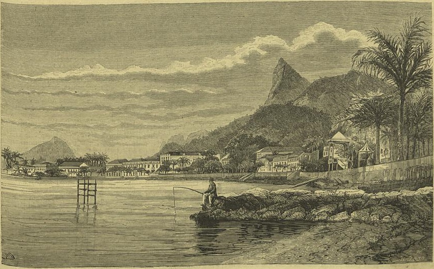 Botafogo